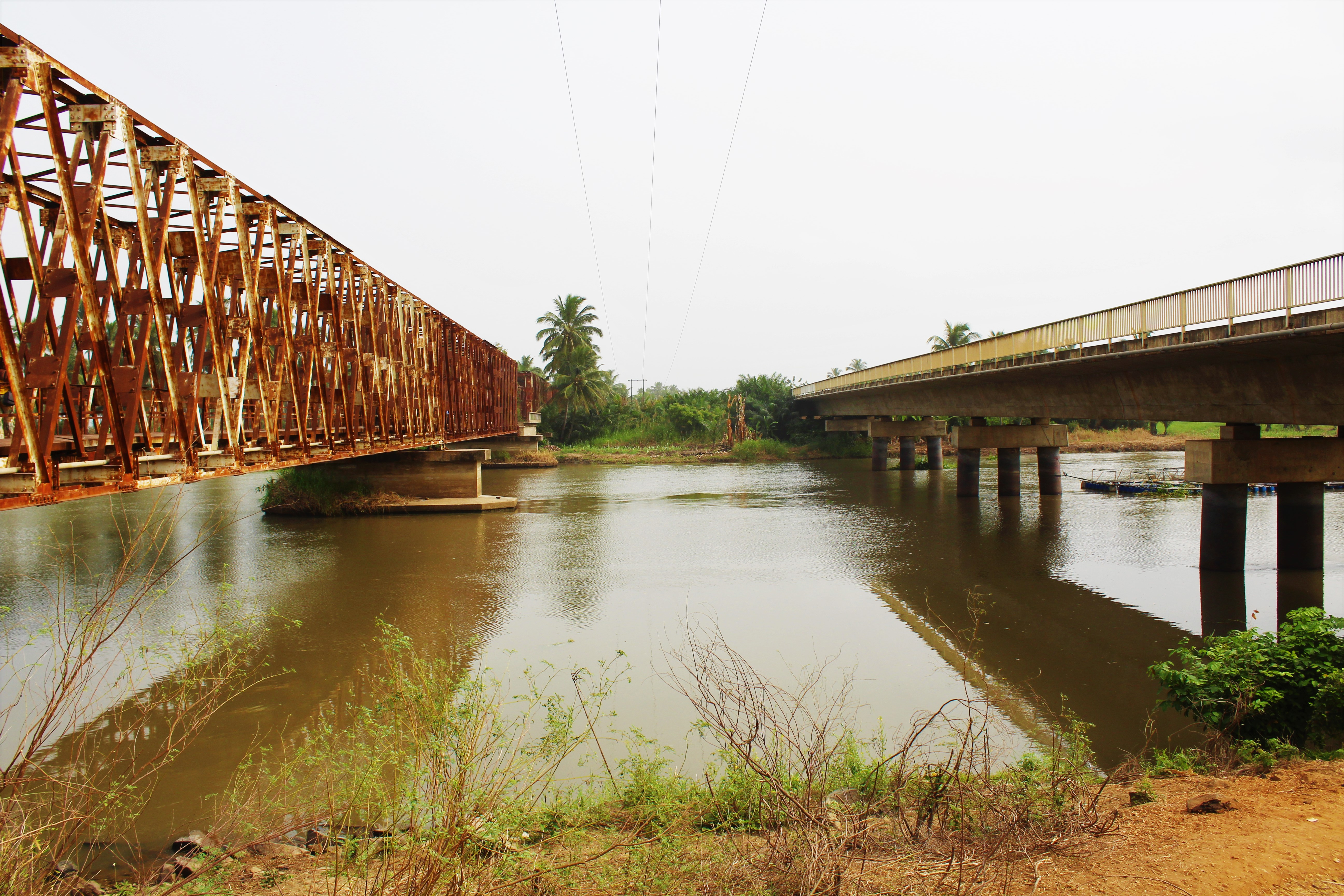 Vue de profil d'un ancien pont à gauche et à droite un autre pont en béton à Grand-Popo au Bénin This is an image with the theme "Africa on the Move or Transport" from: Benin